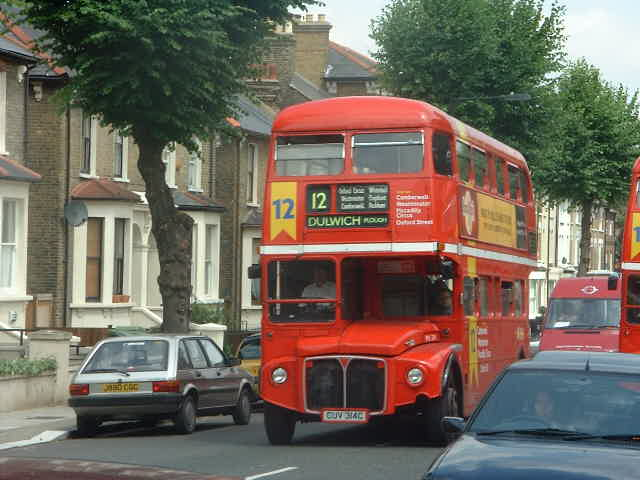 Routemaster RML2314 CUV 314C route 12